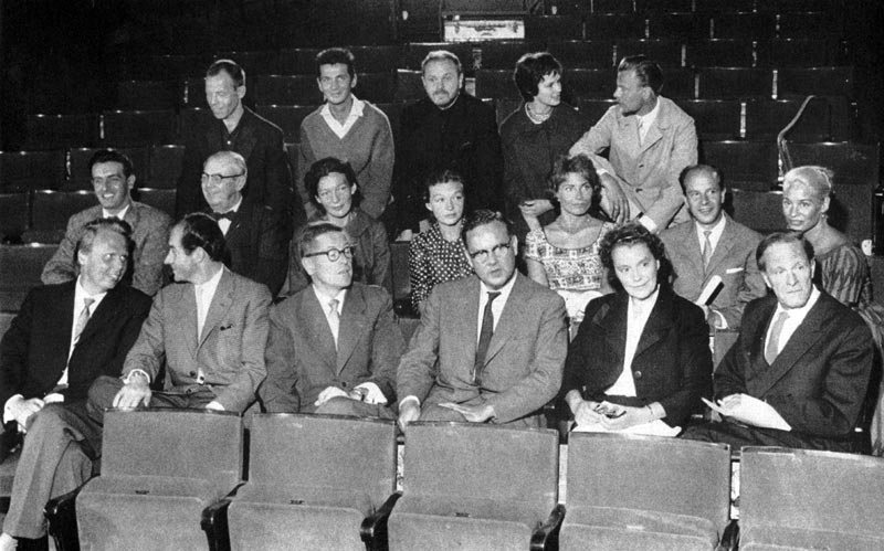 TV-teaterensemblen 1959/60